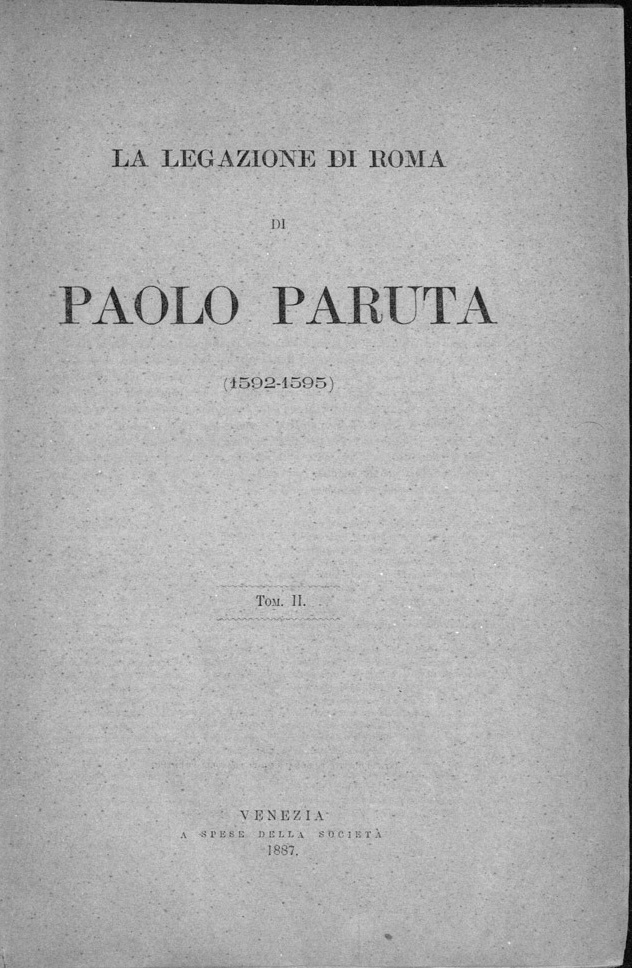 Frontespizio